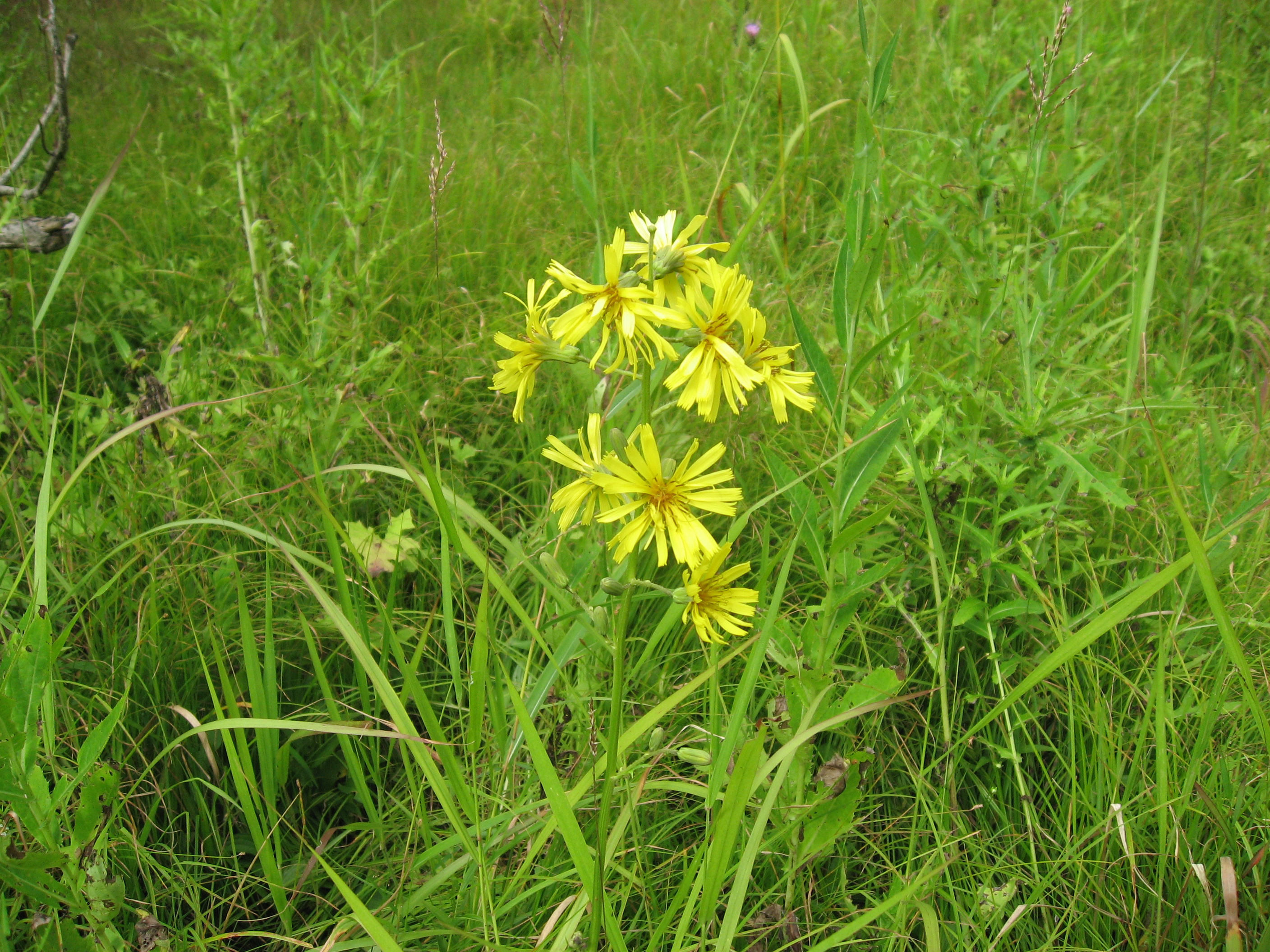 福島県会津地方